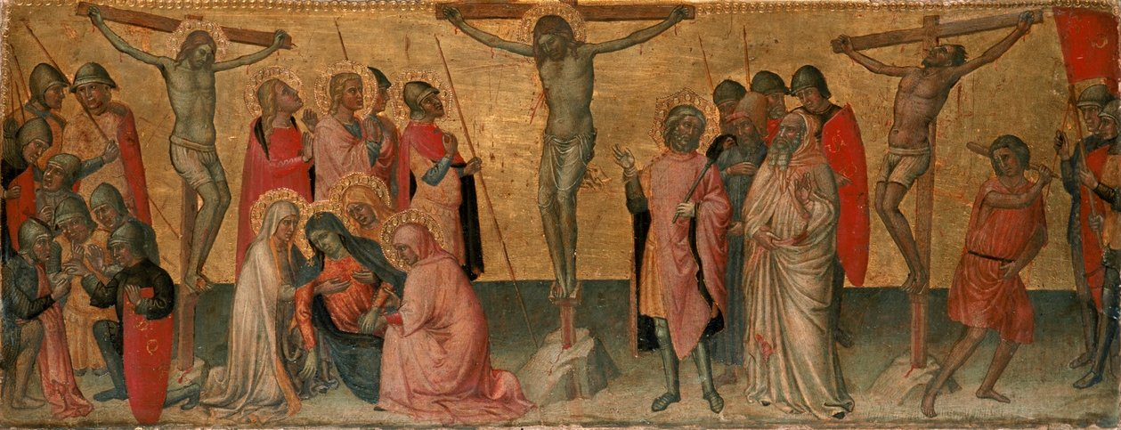 Crucifixion